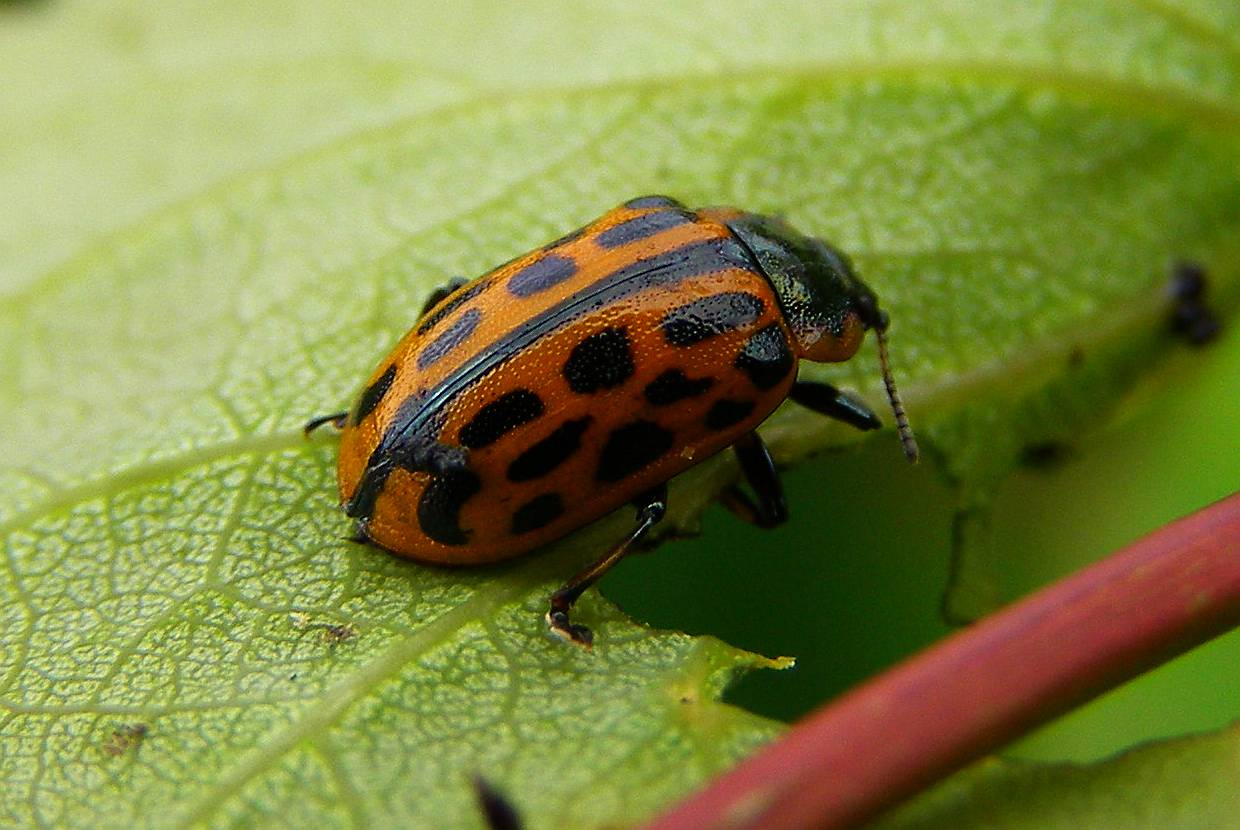 Gefleckter Weidenblattkäfer (Chrysomela vigintipunctata)